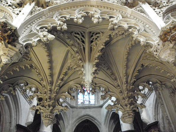 Voûtes du jubé de l'église de la Madeleine de Troyes.